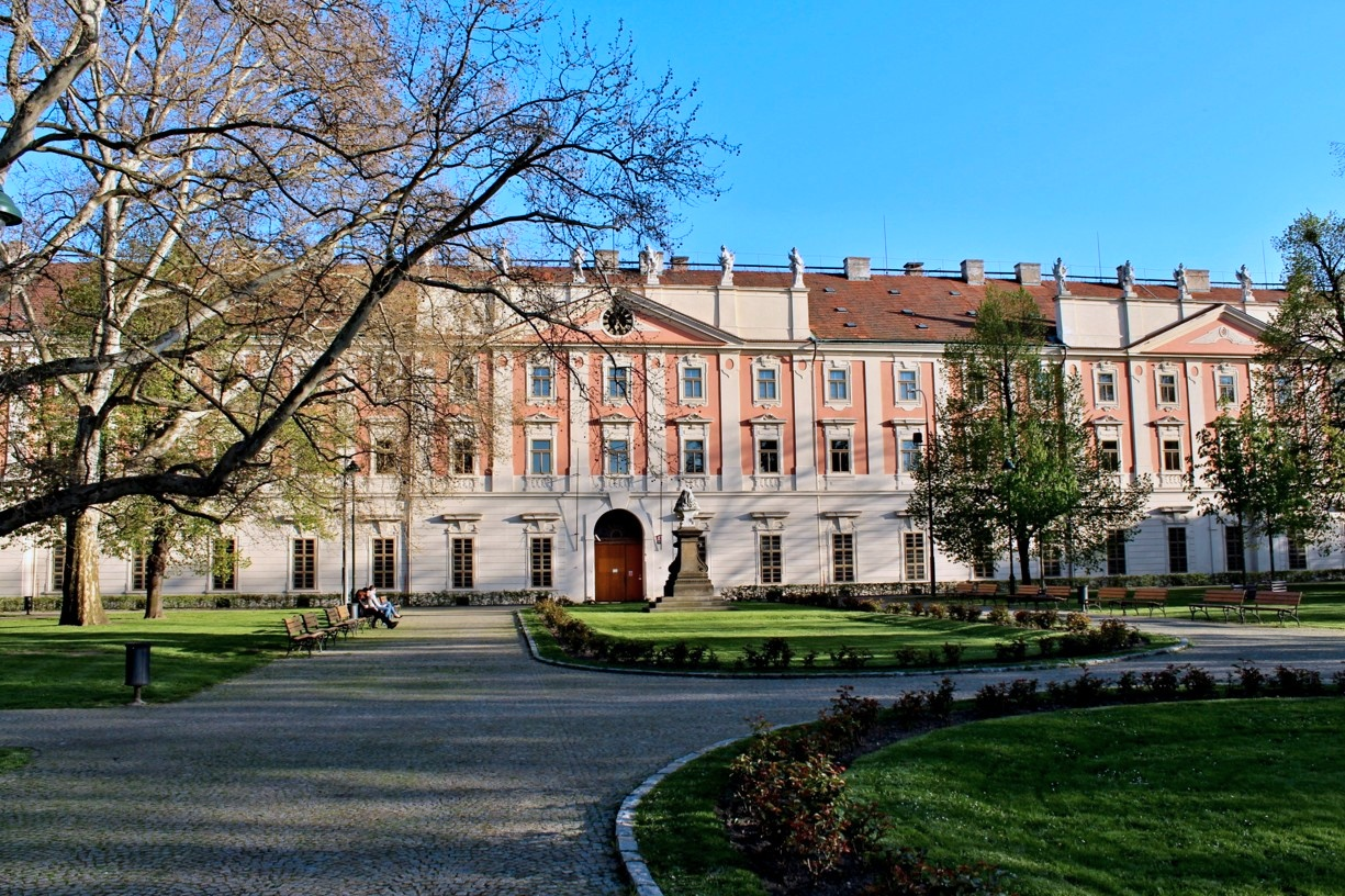 Invalidovna v Praze